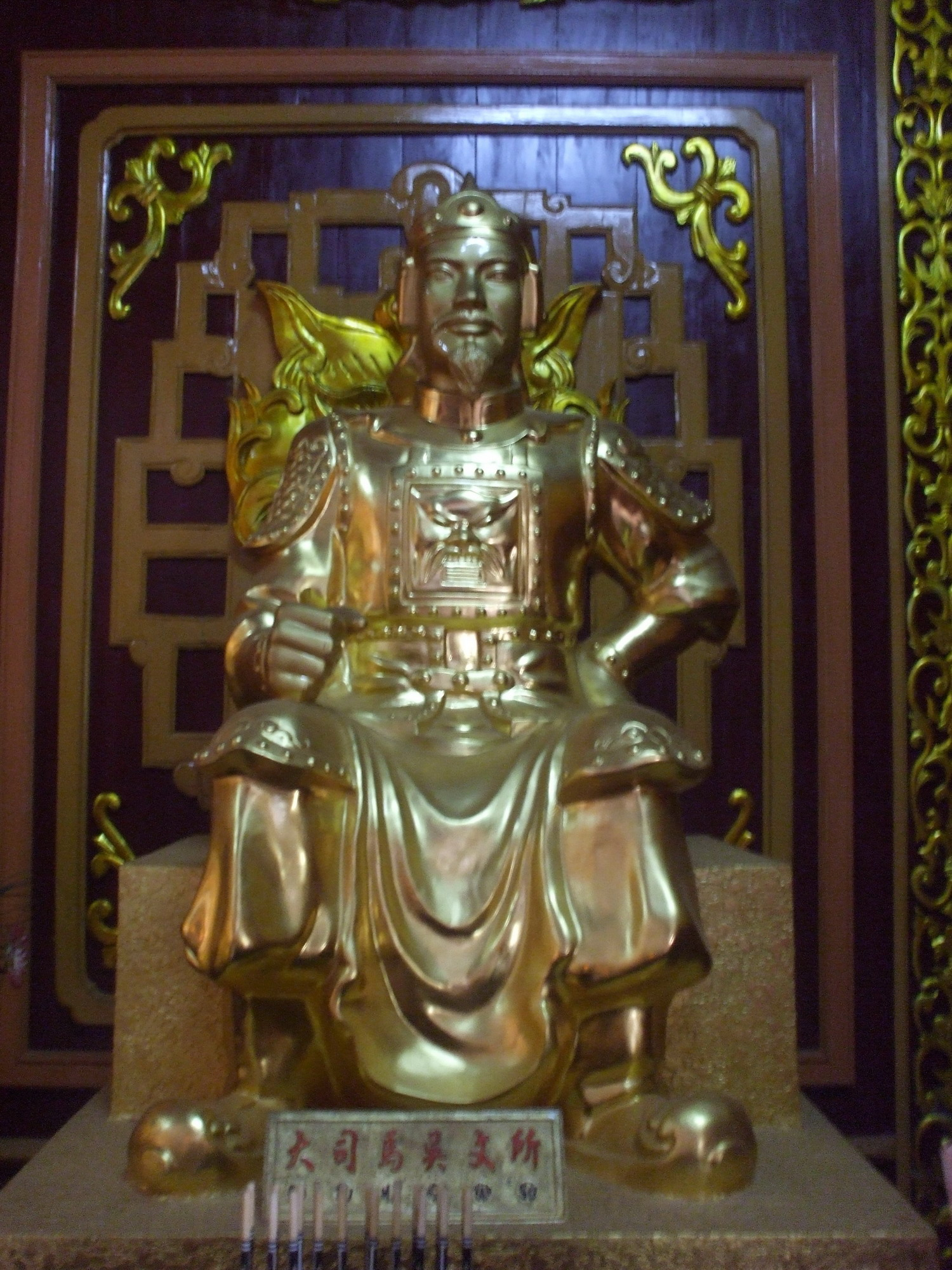 Tượng thờ Đại tư mã Ngô Văn Sở trong Điện thờ Tây Sơn Tam Kiệt (Bảo tàng Quang Trung, Bình Định, Việt Nam)